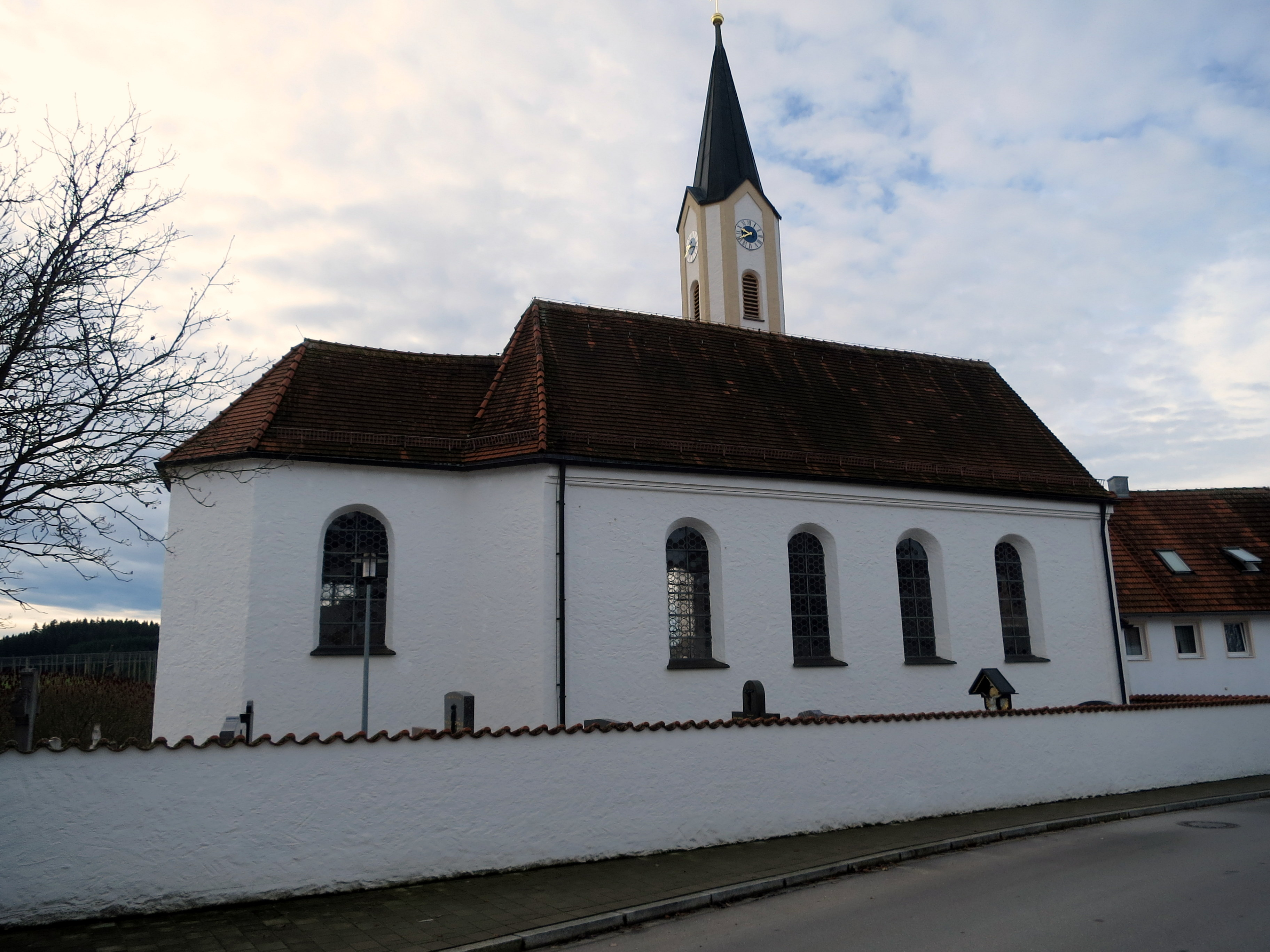 Barocker Saalbau